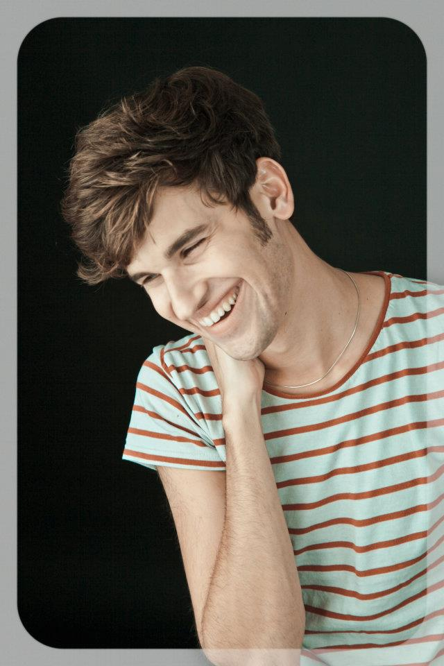 אריאל וולף